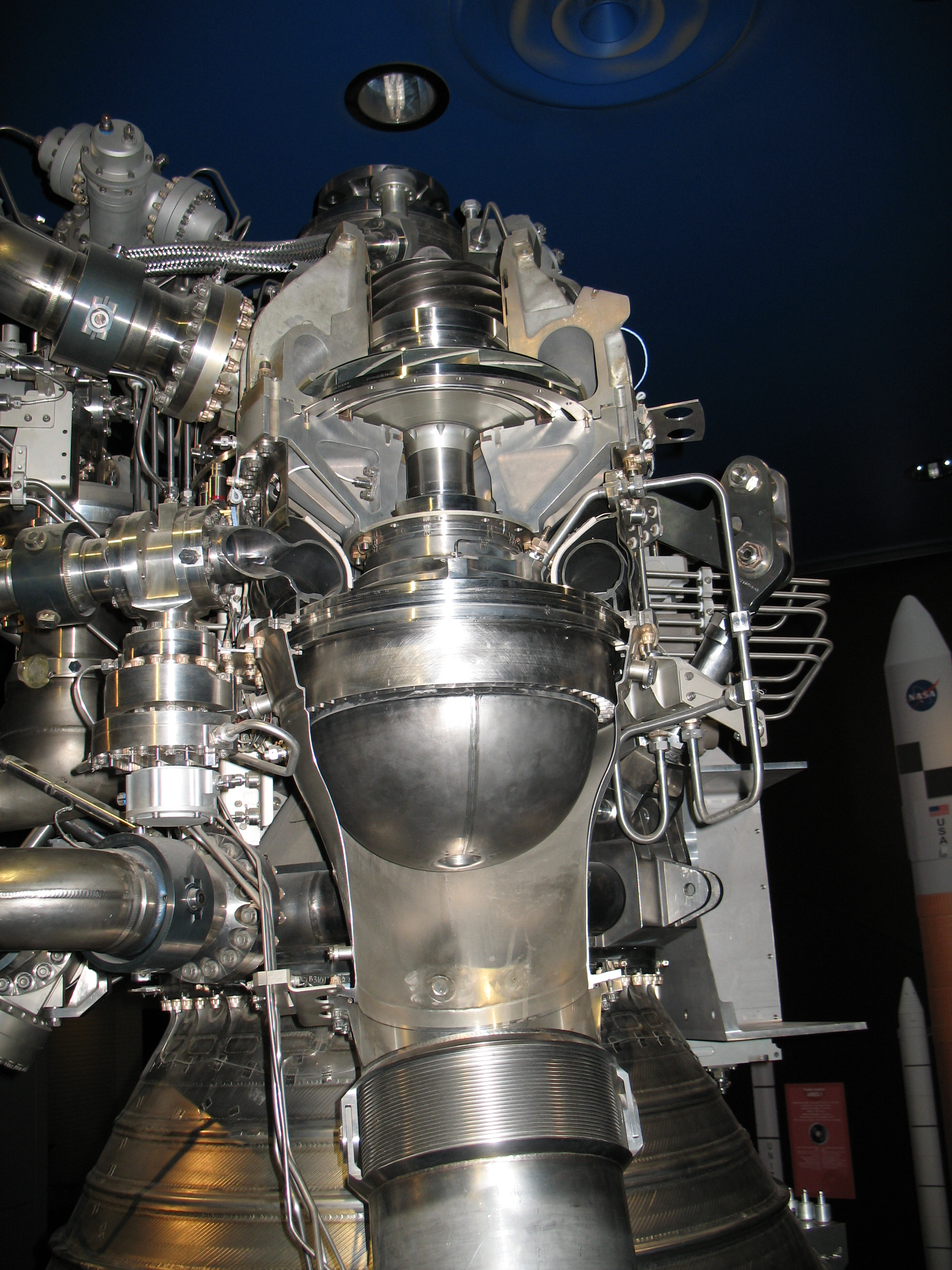 Coupe d'une turbopompe d'un moteur Vulcain équipant le lanceur européen Ariane 5 (photo prise au Musée de l'Espace de Toulouse).